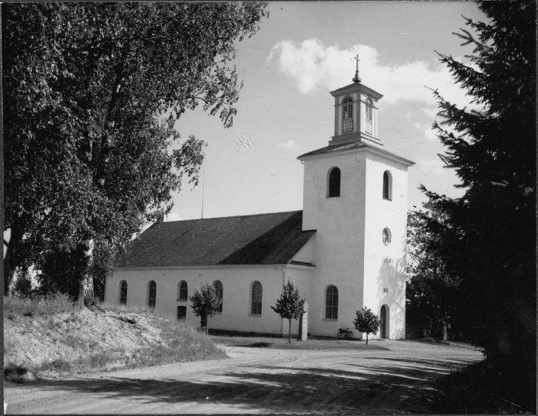 Kyrkan från nordväst. Kategori: (01) ExteriörerKyrkan från nordväst.